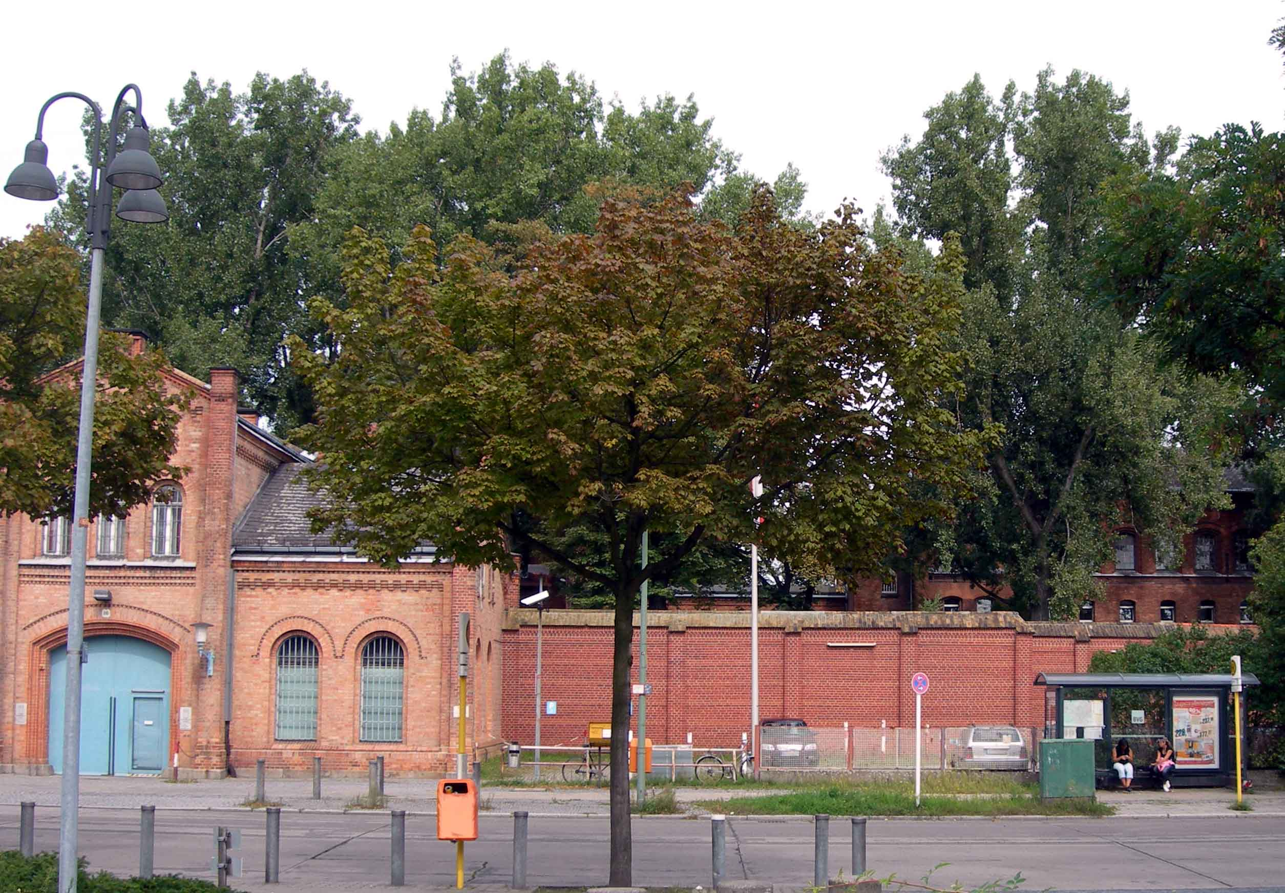 Ploetzensee prison gate lodge